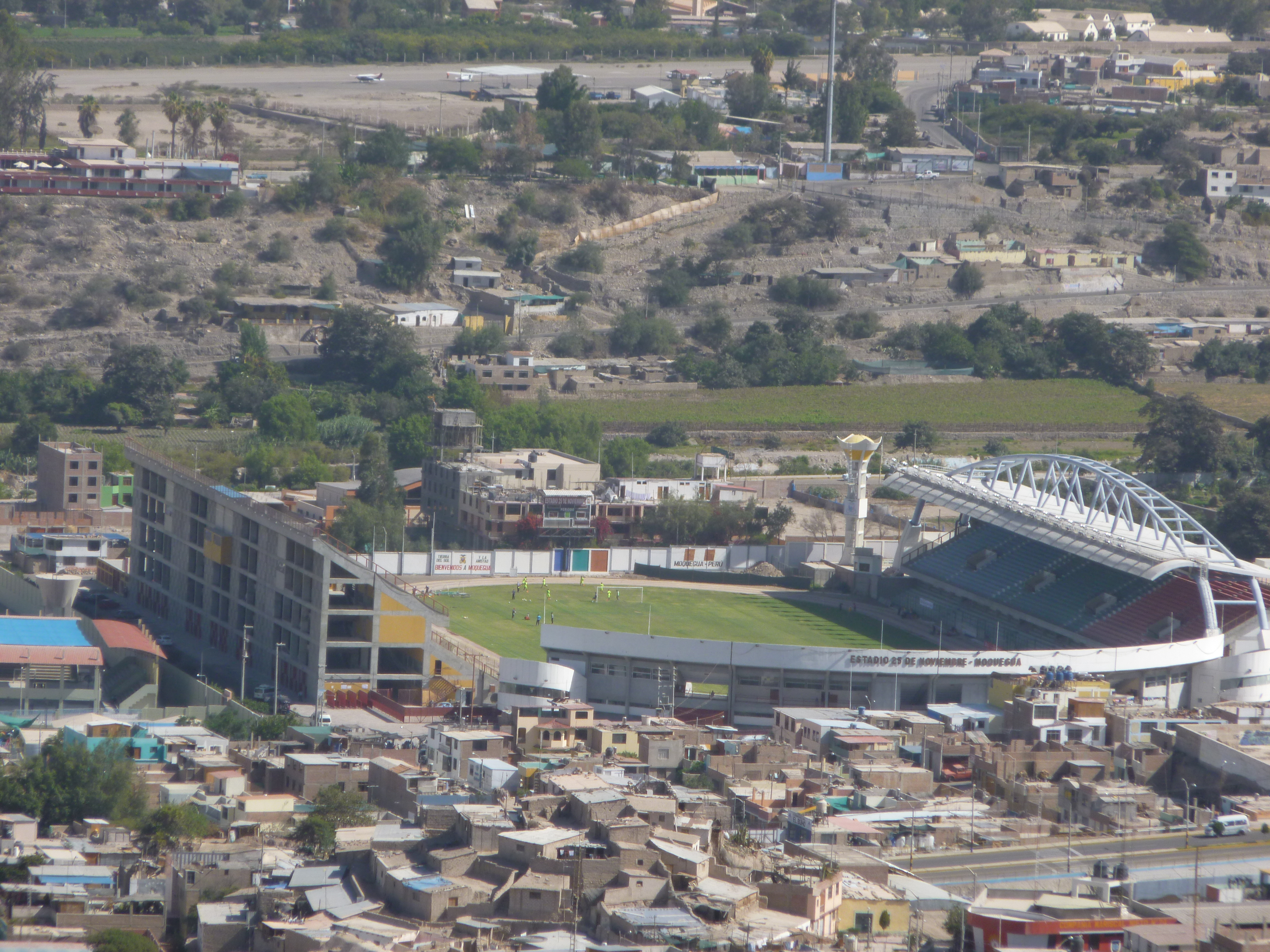 Vista del Estadio 25 de Noviembre desde el Mirador de Moquegua.